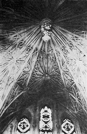 Беларуская (тарашкевіца): Закозель (Zakoziel). Капліца